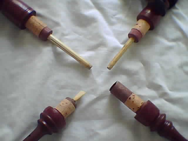 pahleta e válvula da gaita-de-foles galega